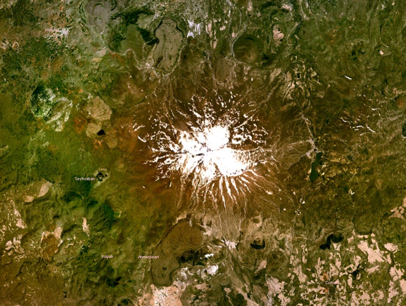 WorldWind, 31.3.2005